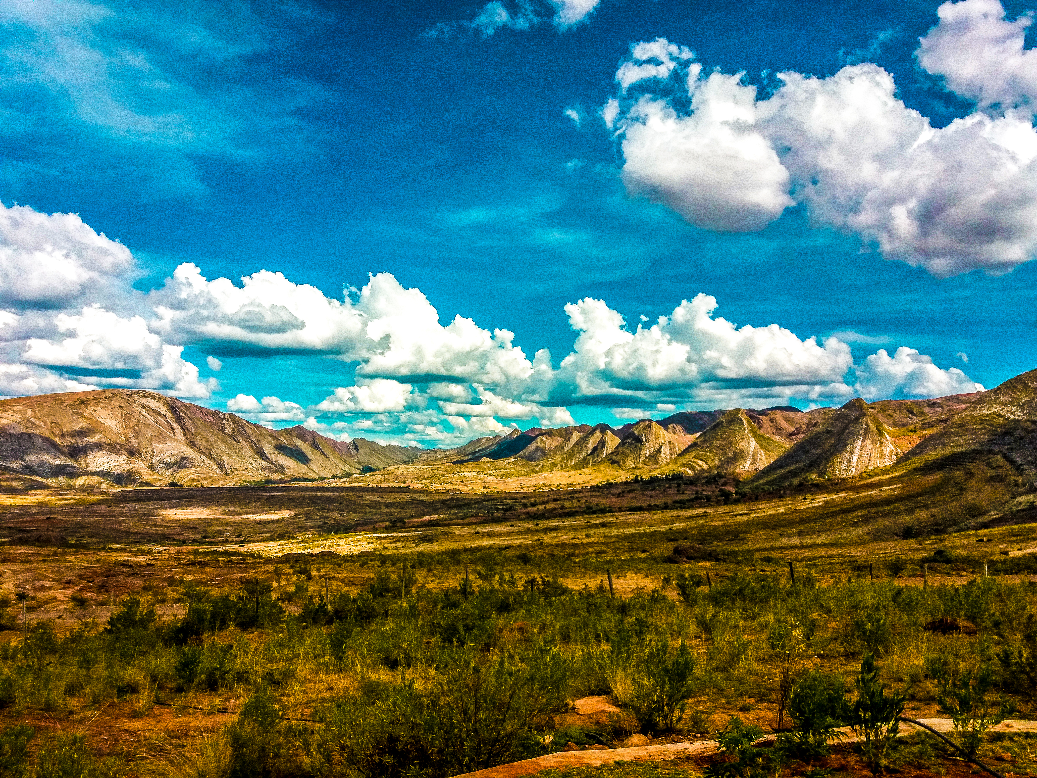 Ubicado en el municipio de Toro Toro